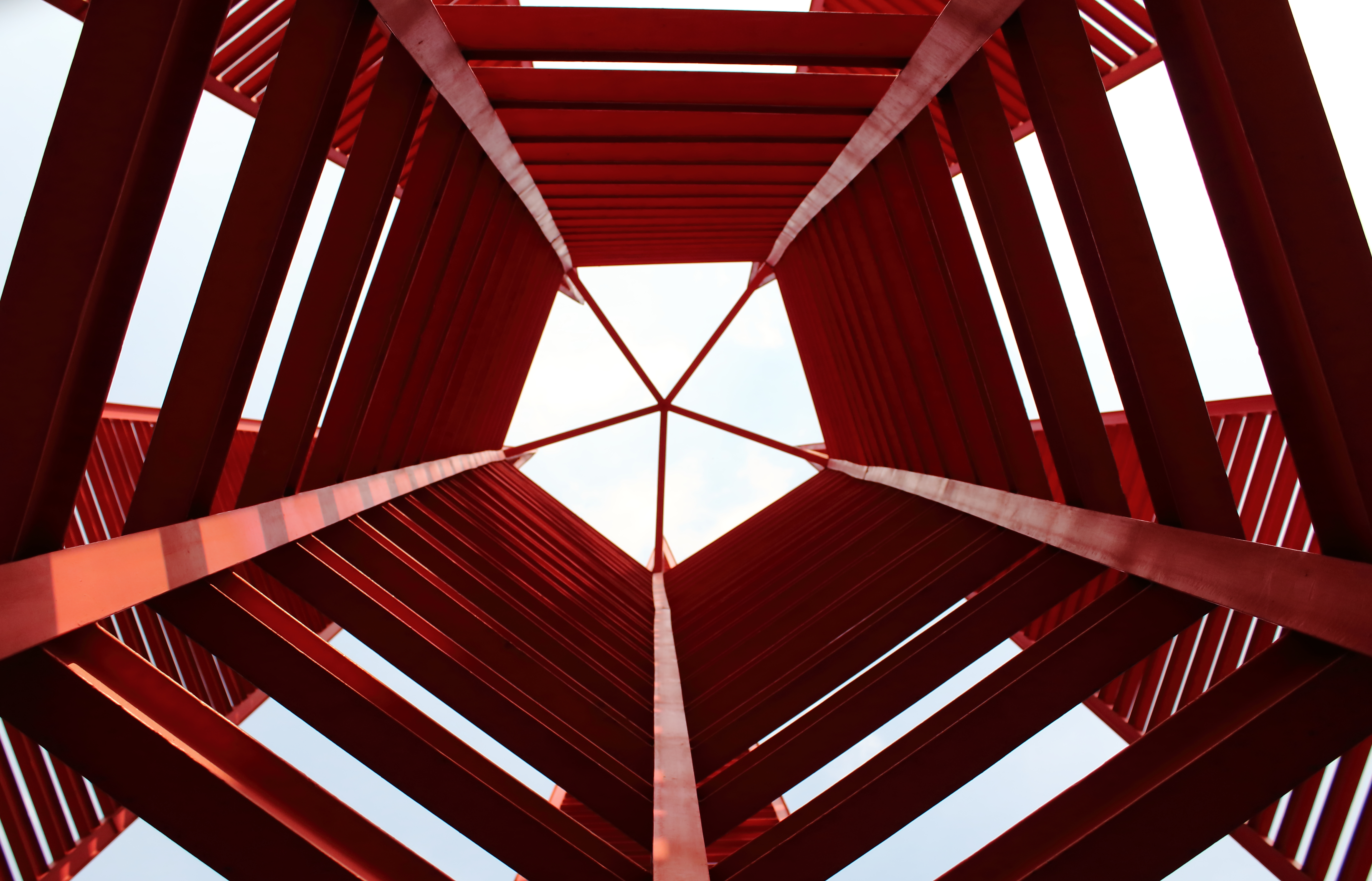 Estructura en del espacio escultórico vista desde abajo.